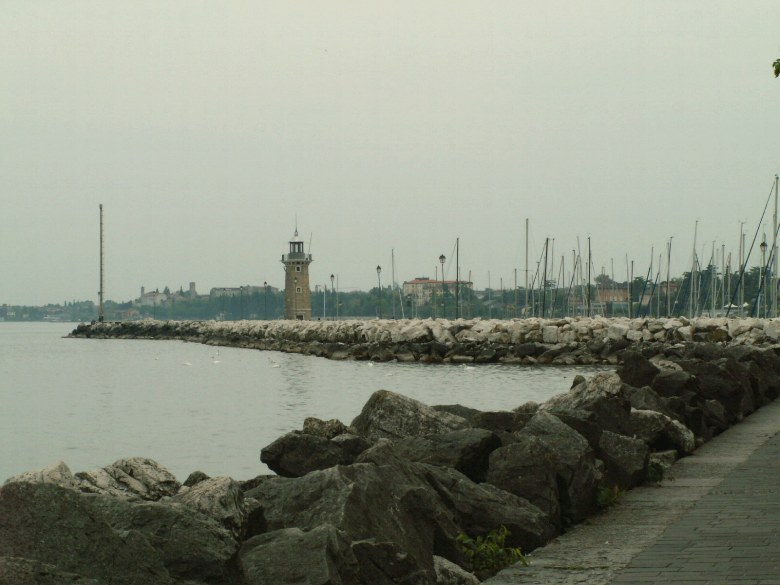 Summary Quelle: selbst fotografiert, 09/2005 Fotograf: Späth Chr. Lizenzstatus: Licensing